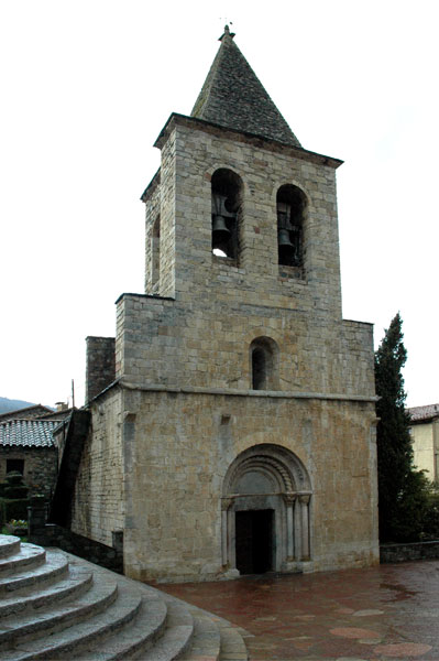 Església de Sant Esteve de Llanars